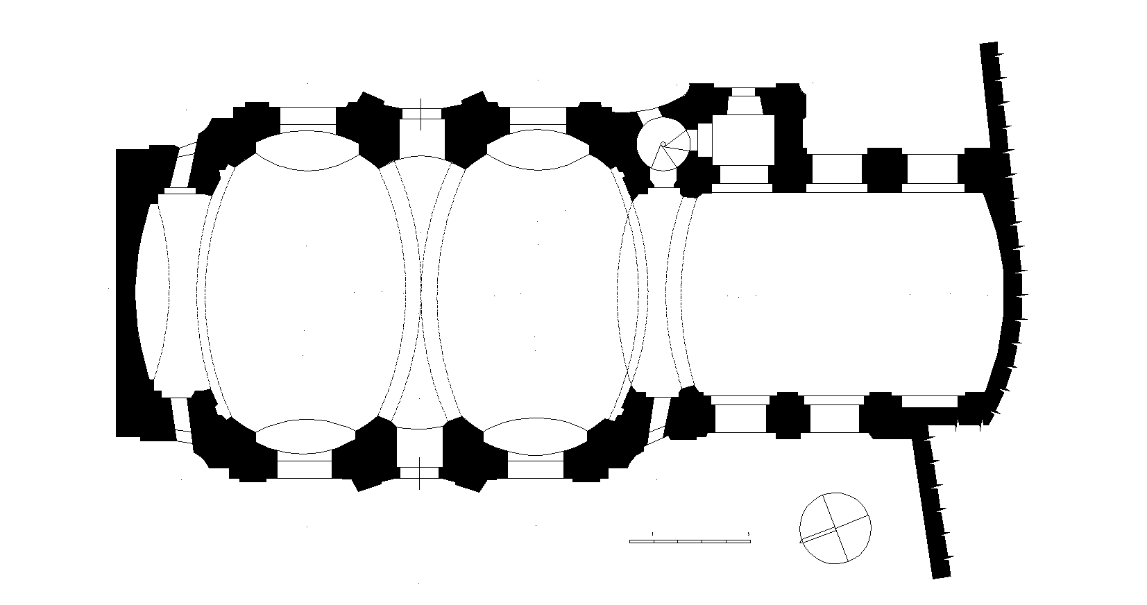 Půdorys bývalého kostela svaté Kláry v Chebu. Návrh architekta Kryštofa Dientzenhofera, 1707-1711